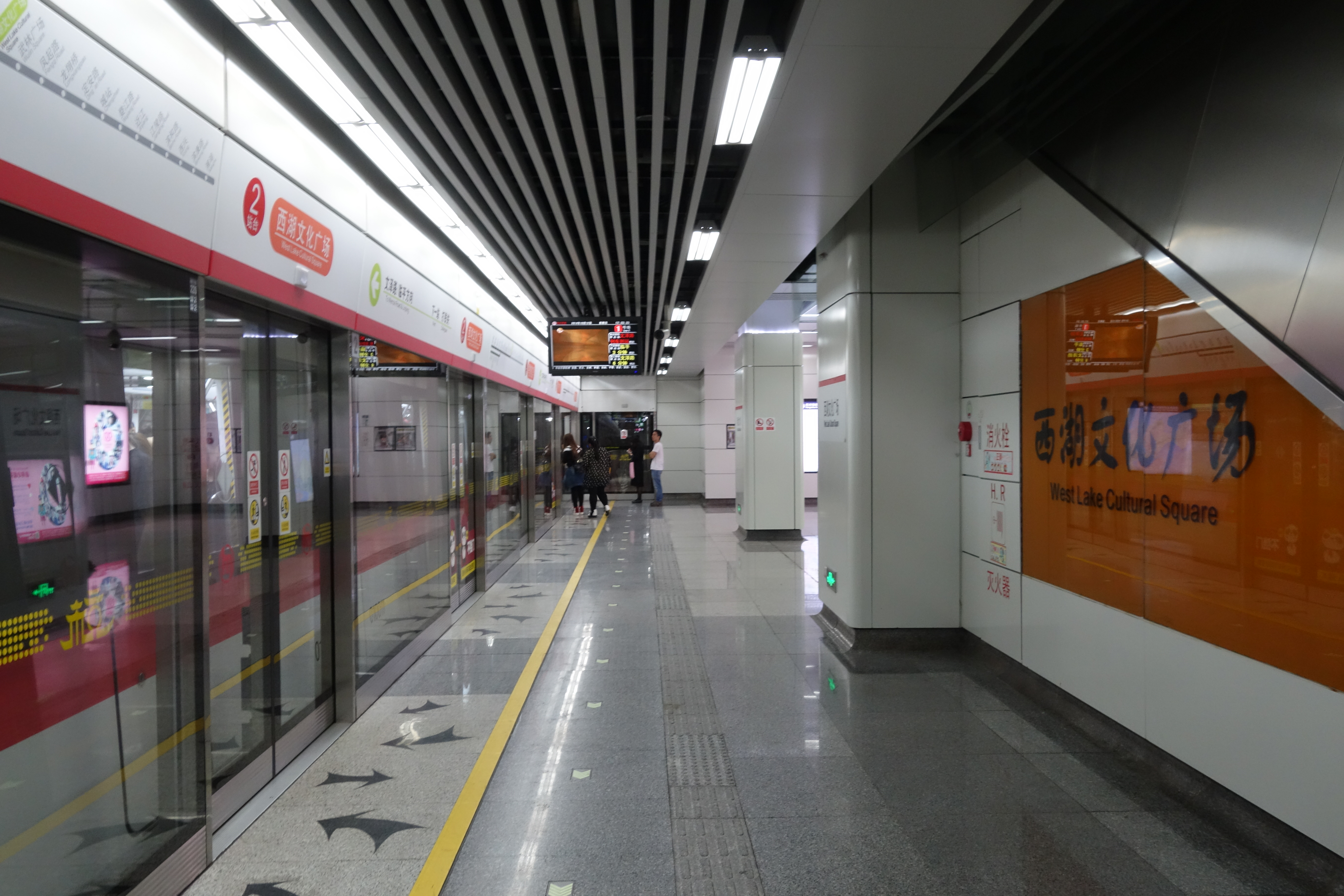 杭州地铁西湖文化广场站